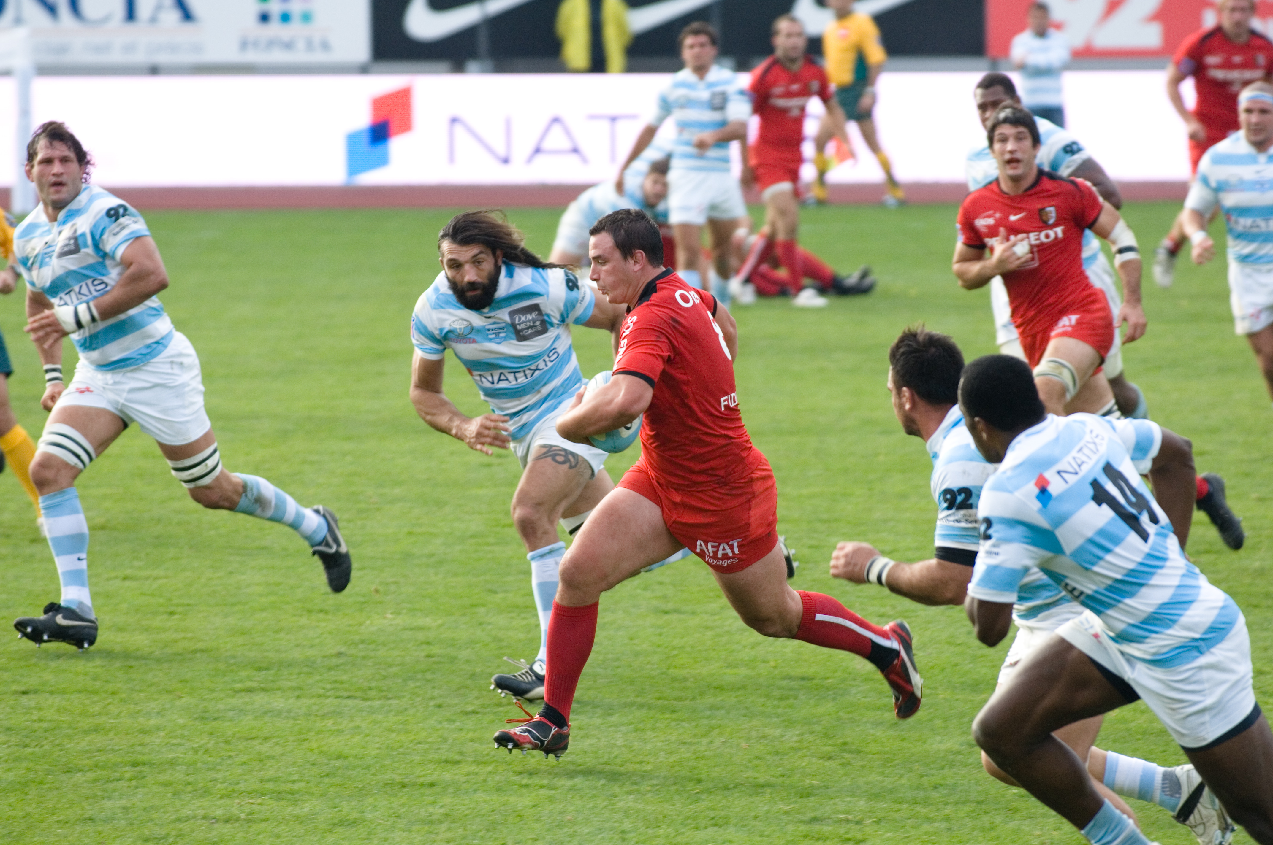 Sébastien Chabal avec le Racing Métro 92 en défense face à Louis Picamoles du Stade Toulousain au stade Yves-du-Manoir à Colombes (92). Lionel Nallet apparaît à gauche. Top 14 2009-2010